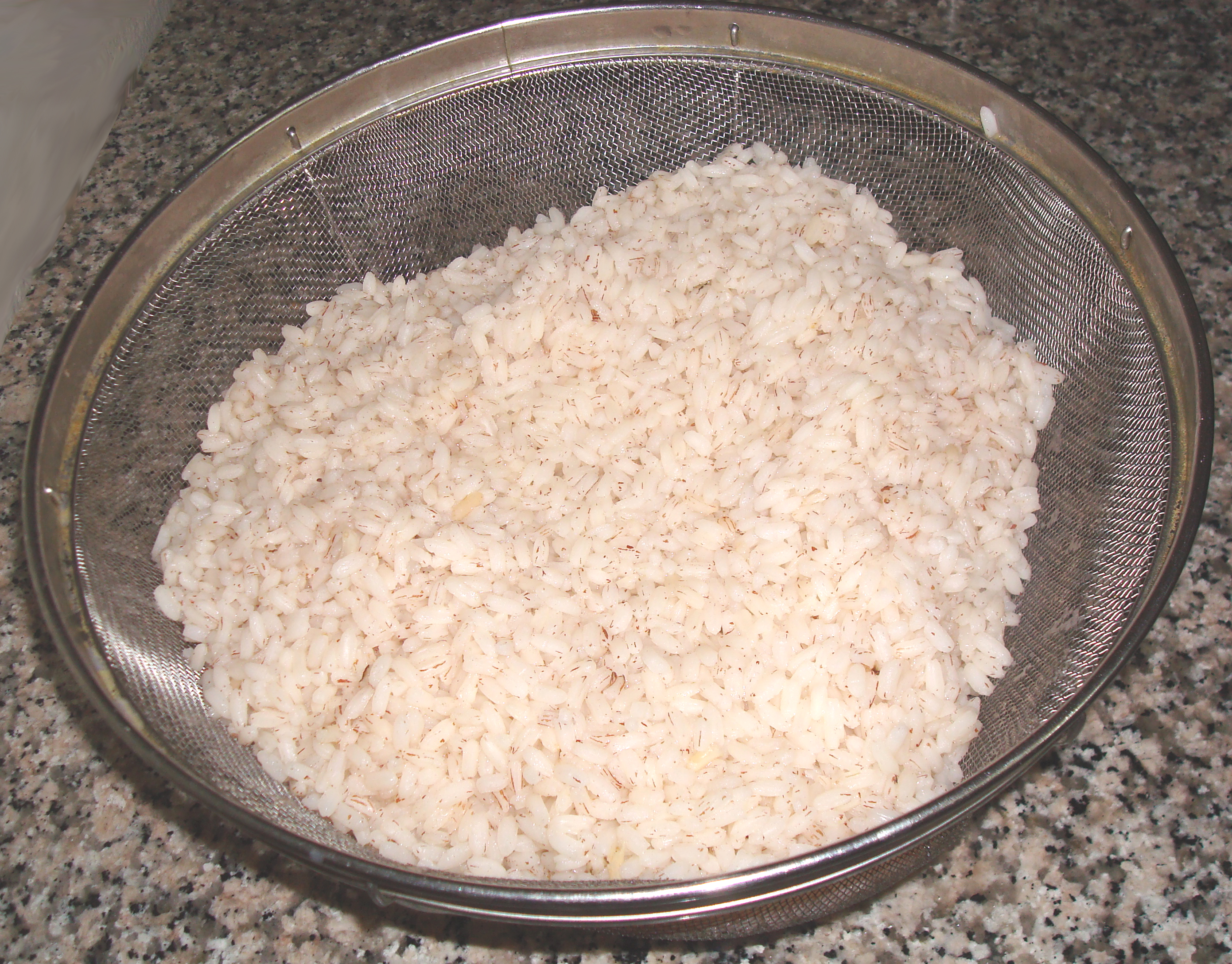 ചോറ്‌ - rice - വെള്ളം വാർത്തെടുക്കുന്നു.